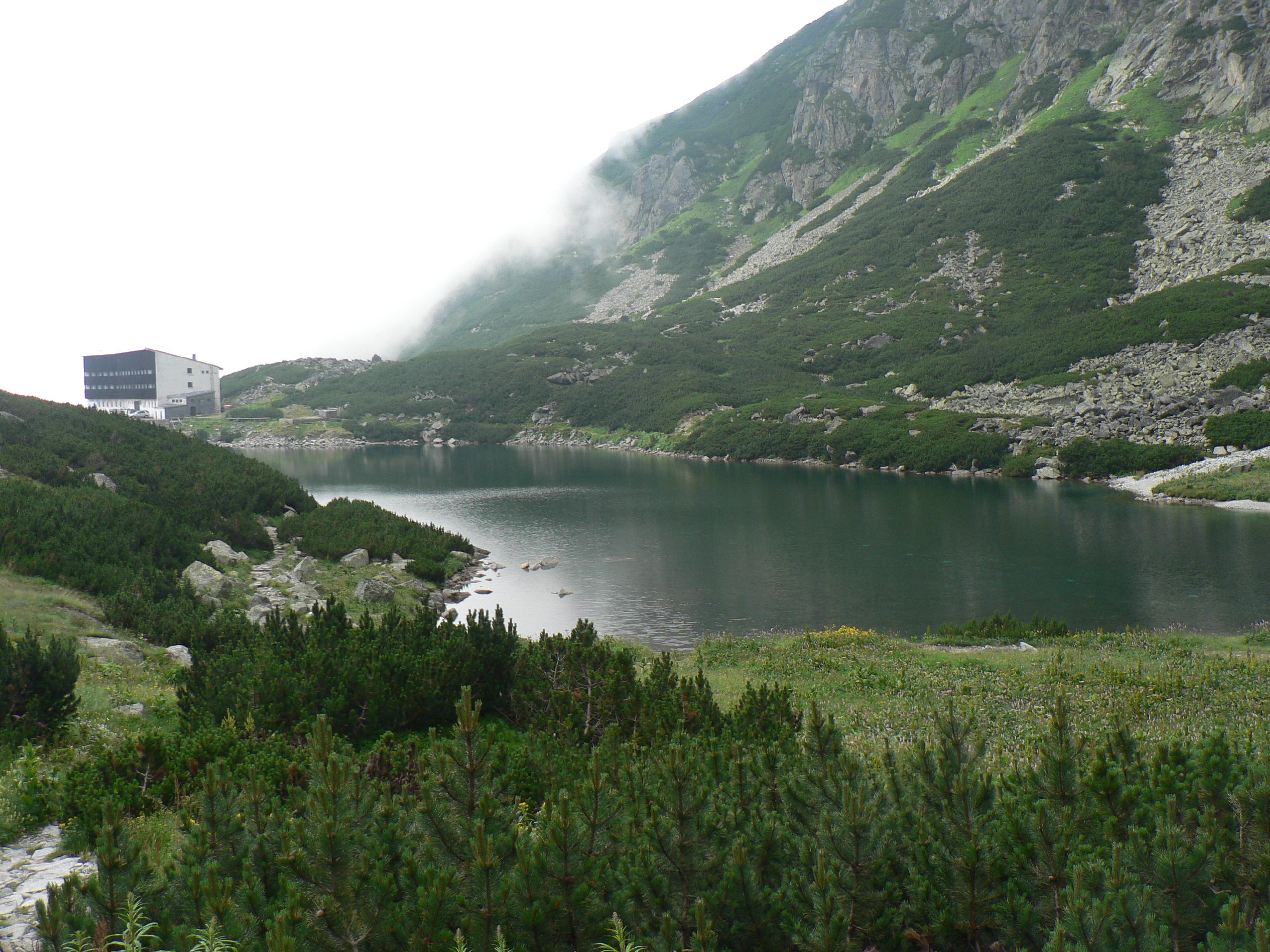 Wielicki Staw i hotel górski Śląski Dom